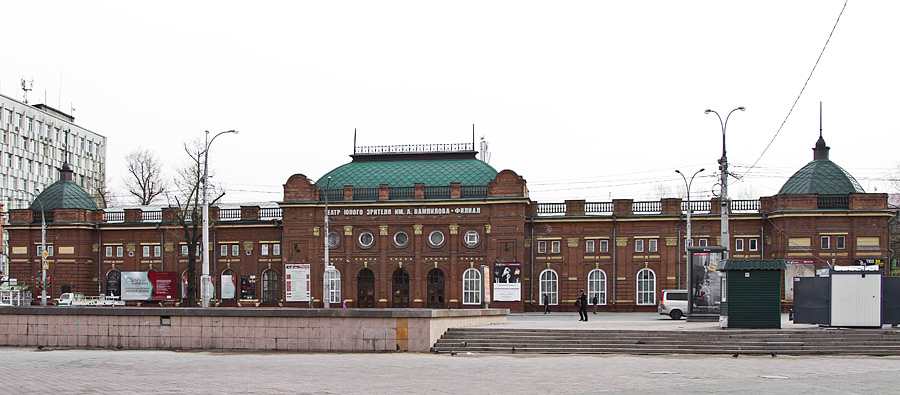 Дом общественного собрания (ул. Ленина, 23) – старое здание Театра музыкальной комедии. архитектор В А Рассушин